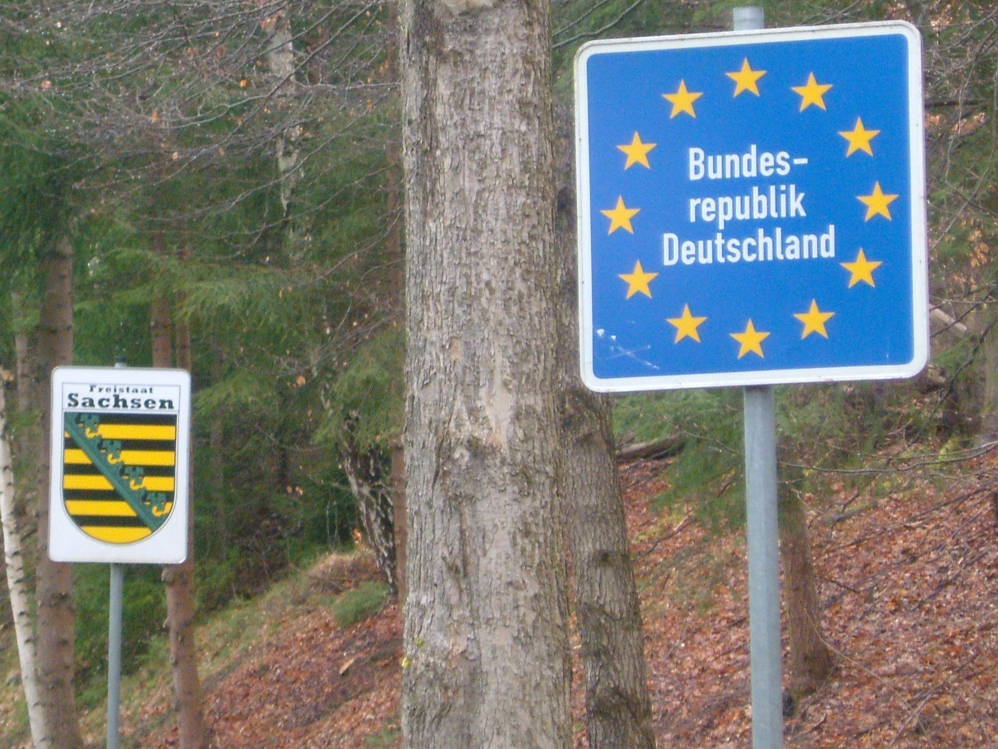 Bad Elster, Saxony, Germany in April 2008. Border Signs EU and Freistaat Sachsen